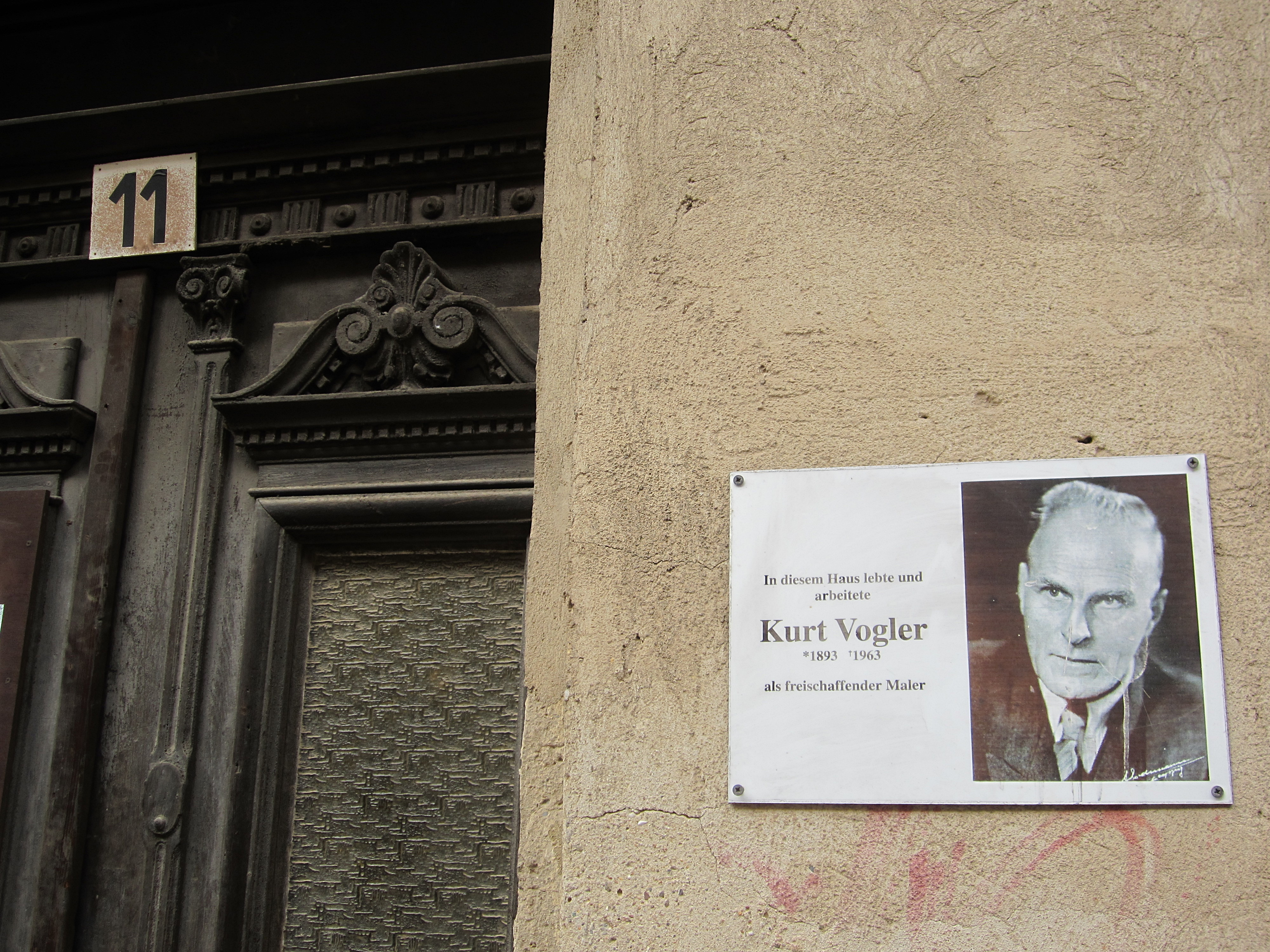 Leipzig, Ludwigstraße 11; Gedenktafel an Kurt Vogler.